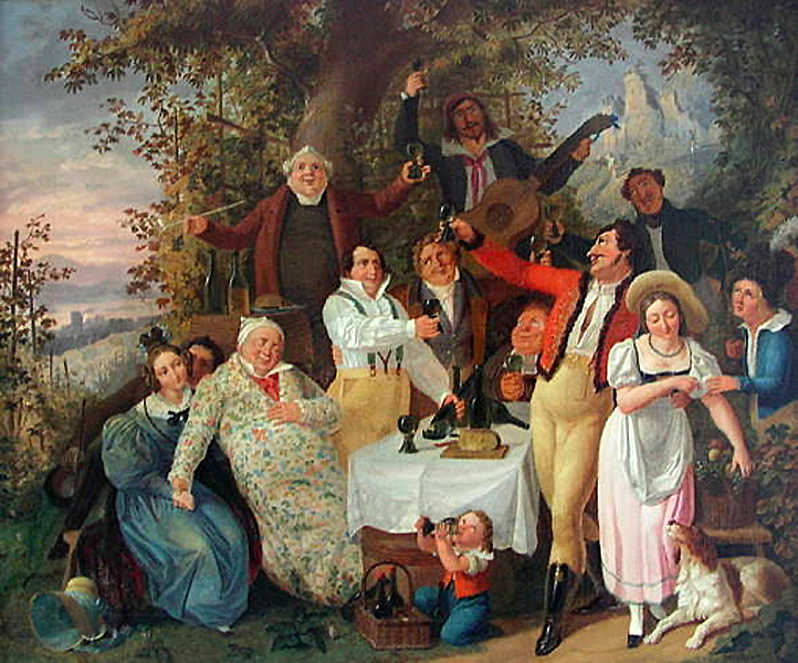 Die Rheinweise